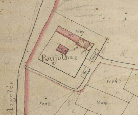 Pujols, d'Argelers. en el Cadastre napoleònic del 1812 (Arxius Departamentals dels Pirineus Orientals)